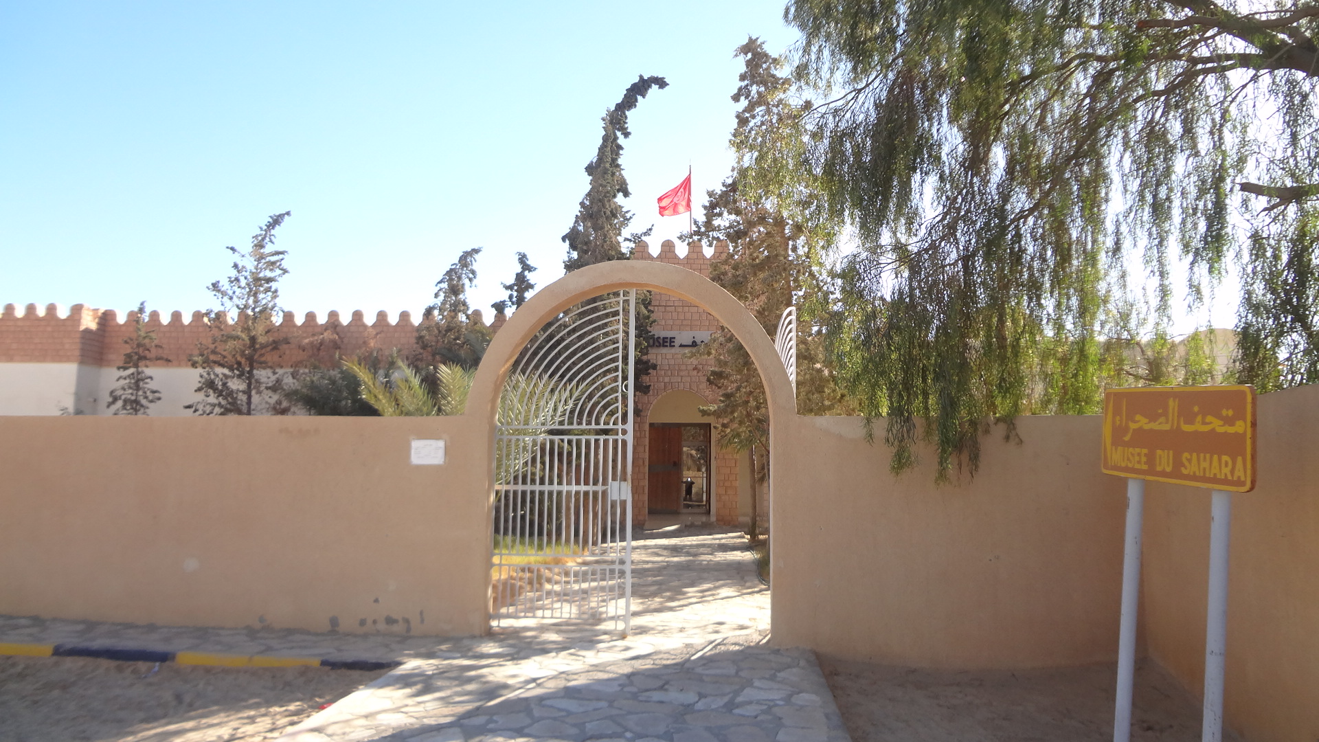 Musée du Sahara Douz